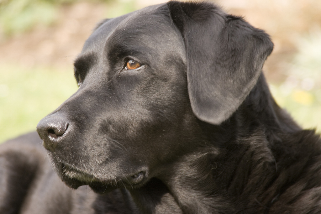 A female black Labrador Retriever named Ellis.